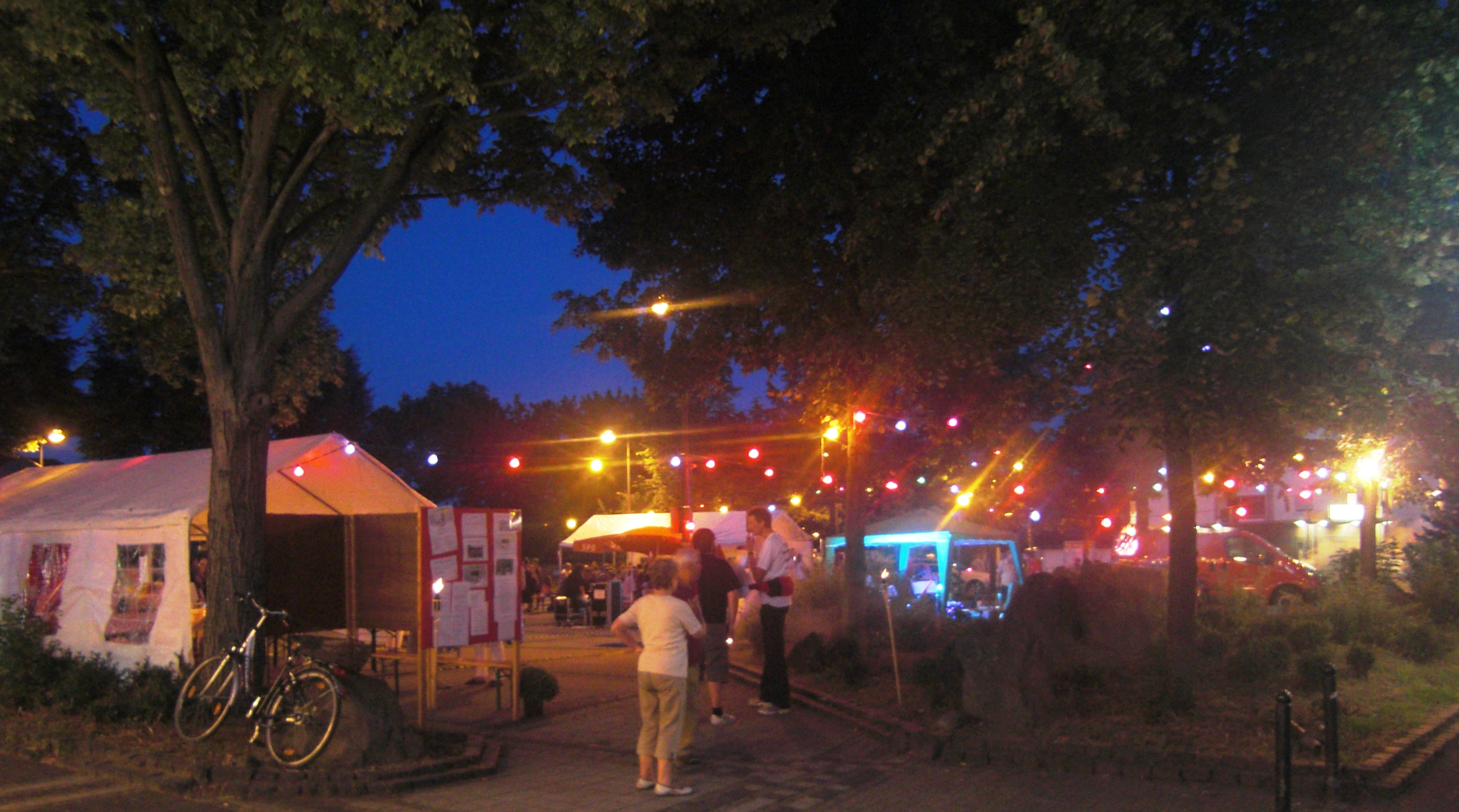 Lichterfest auf dem Marktplatz in Köln Poll, Veranstalter SPD